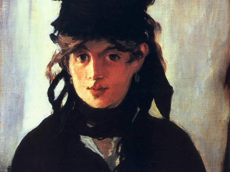 detail